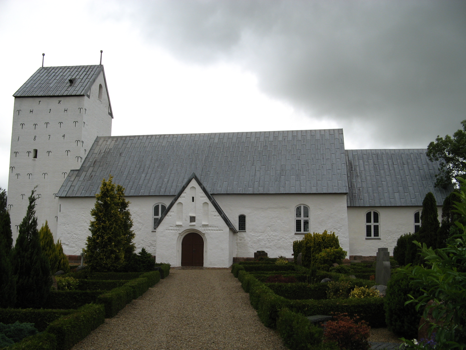 Guldager Kirke, Guldager sogn, Esbjerg Kommune (former: Skads Herred, Ribe Amt). Kirken set fra syd.